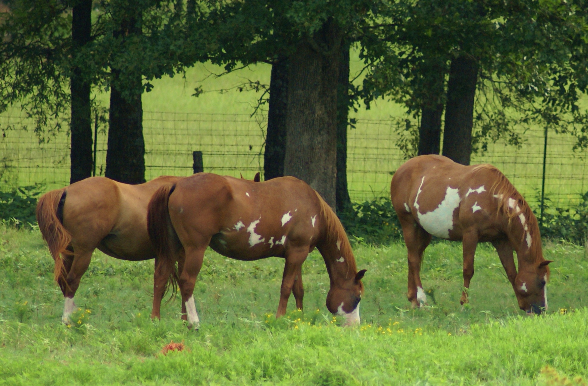 grazing paints